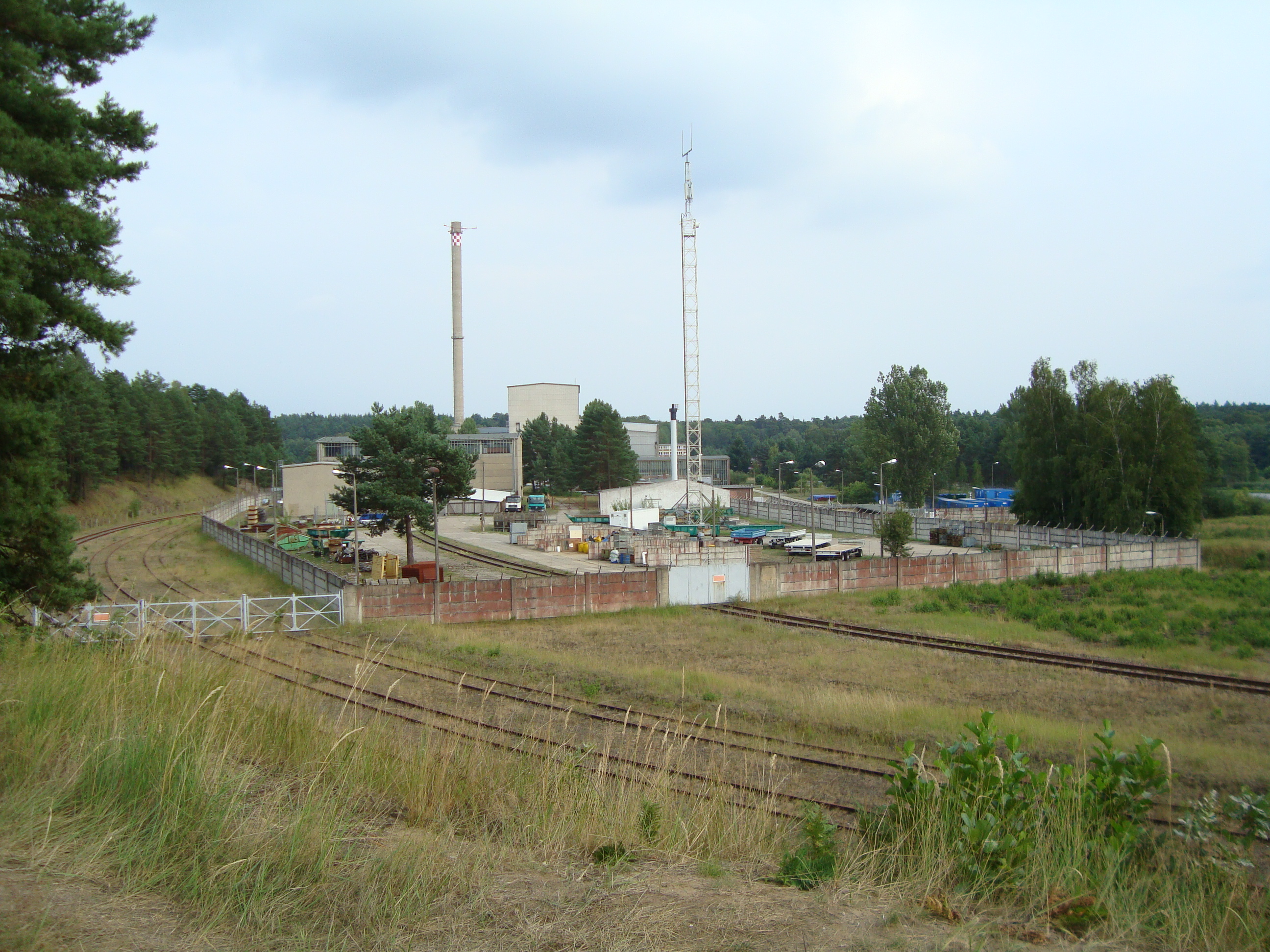 Blick auf das ehemalige Kernkraftwerk Rheinsberg